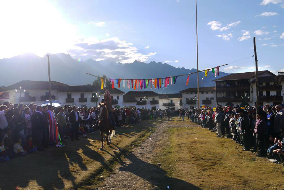 Carrera de cintas a Caballo